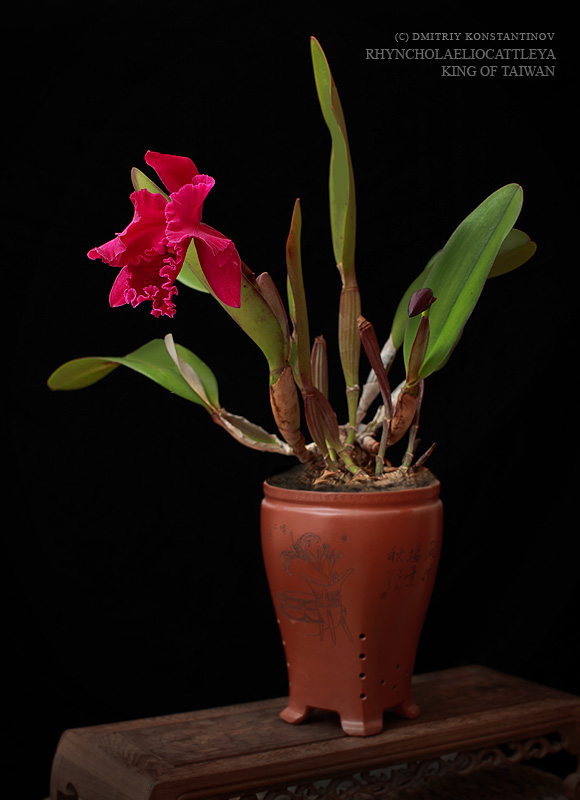 × Rhyncholaeliocattleya King Of Taiwan